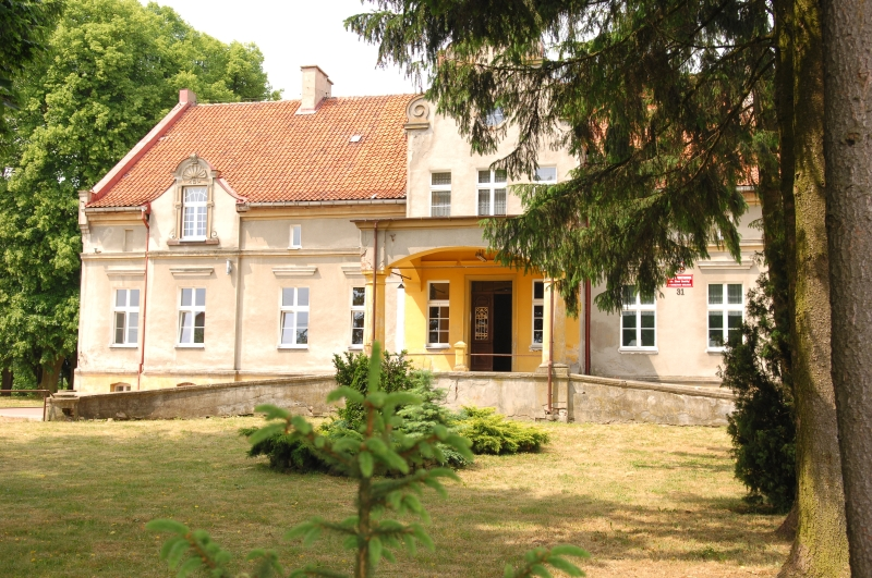 Neobarokowy pałac w Babiętach Wielkich - obecnie Szkoła Podstawowa im. Ziemi Suskiej w Babietach Wielkich